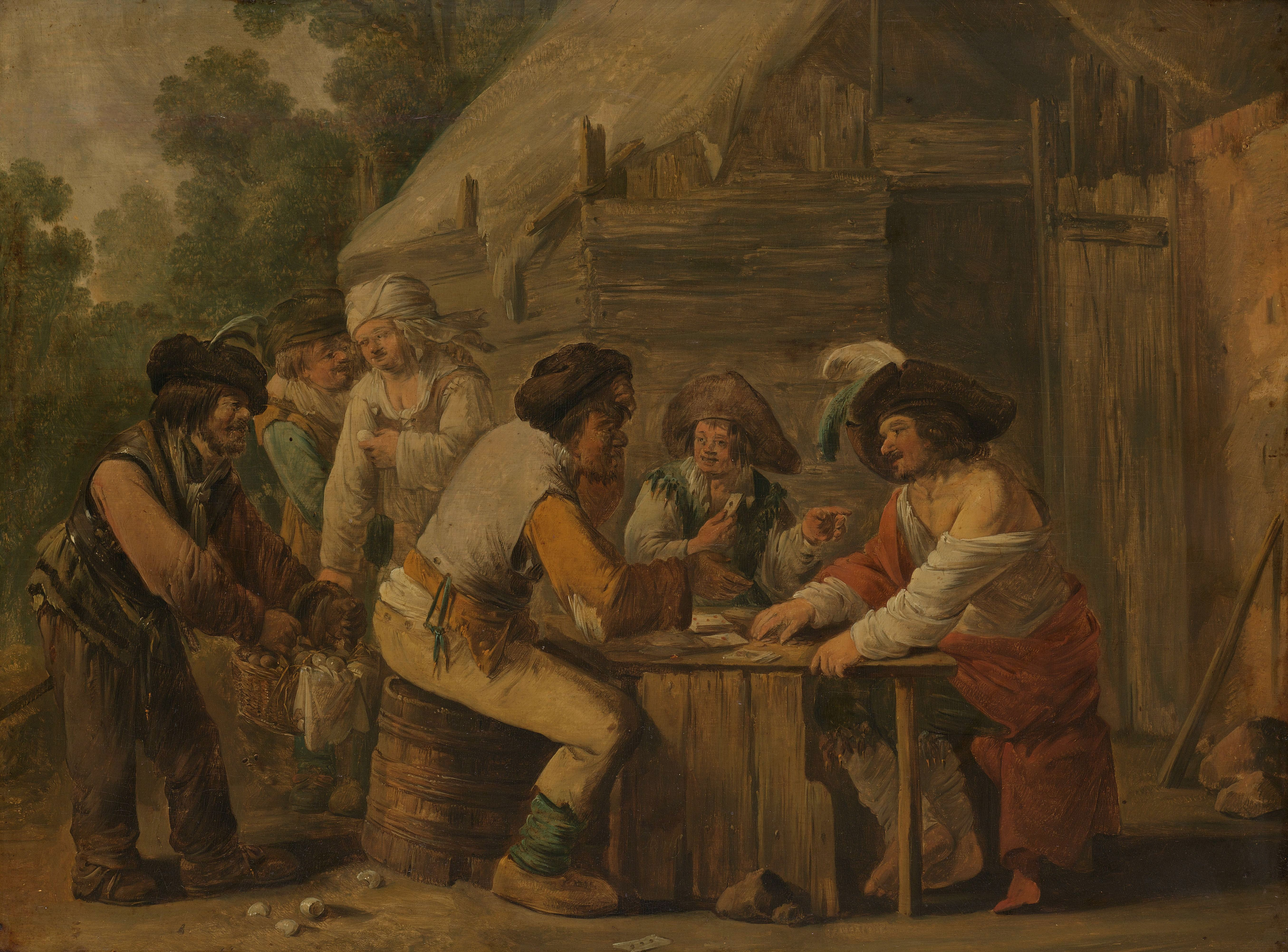 De kaartspelers. Drie mannen zitten rond een tafel voor een schuur te kaarten. Links een vrouw bij een man die een mand met eieren bij zich draagt.